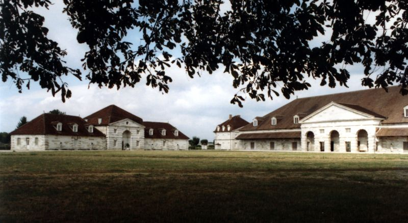 Königliche Saline in Arc-et-Senans